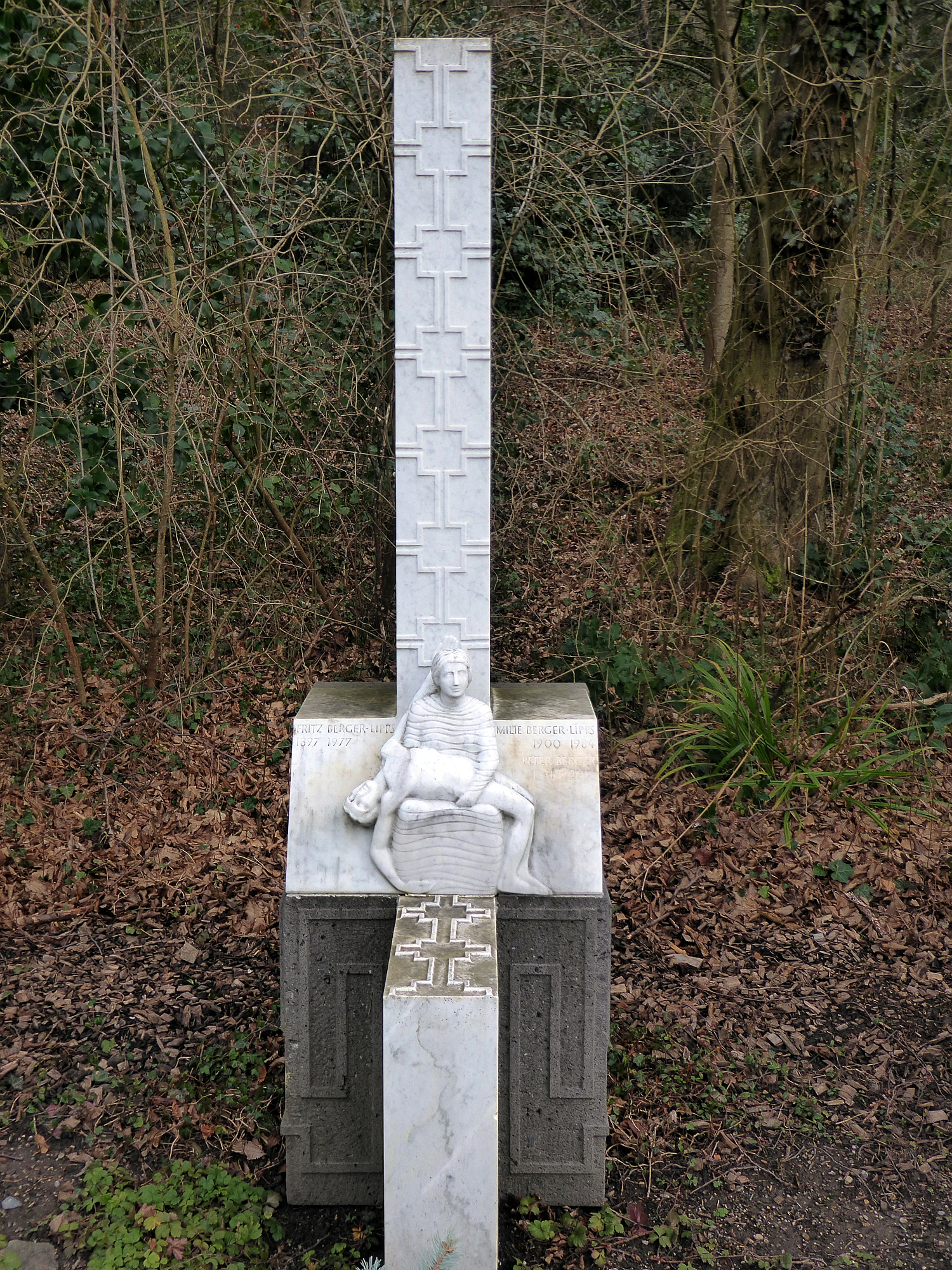 Fritz Berger-Lipps (1897–1977) Steinhauer, Bauzeichner, Politiker Grab auf dem Friedhof Hörnli, Riehen, Basel-Stadt